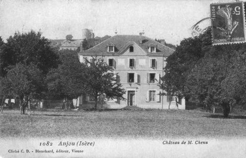 Chateau de M. Chenu. Anjou, Isère, France. Carte postale ancienne.